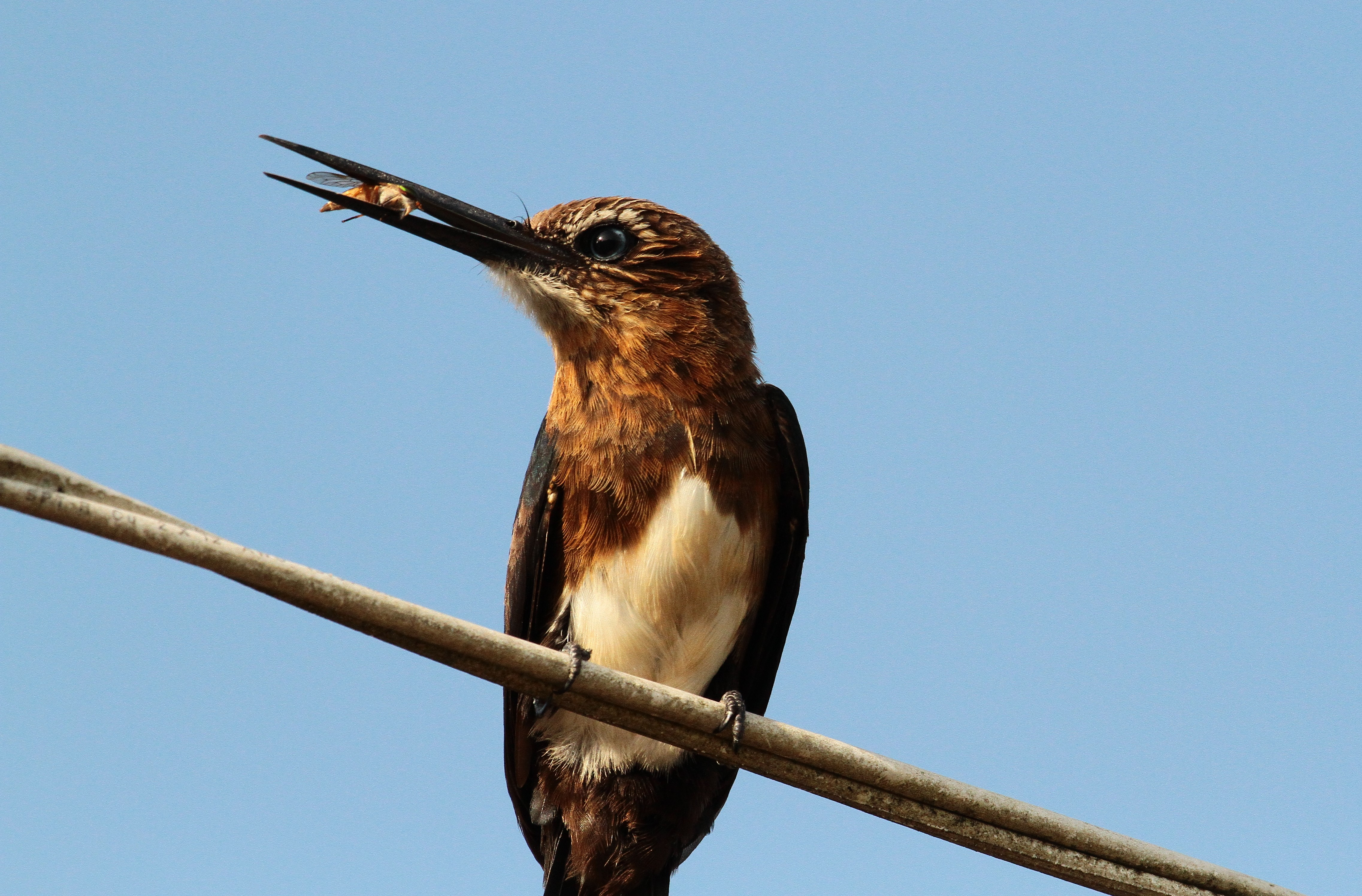 Gran Sabana